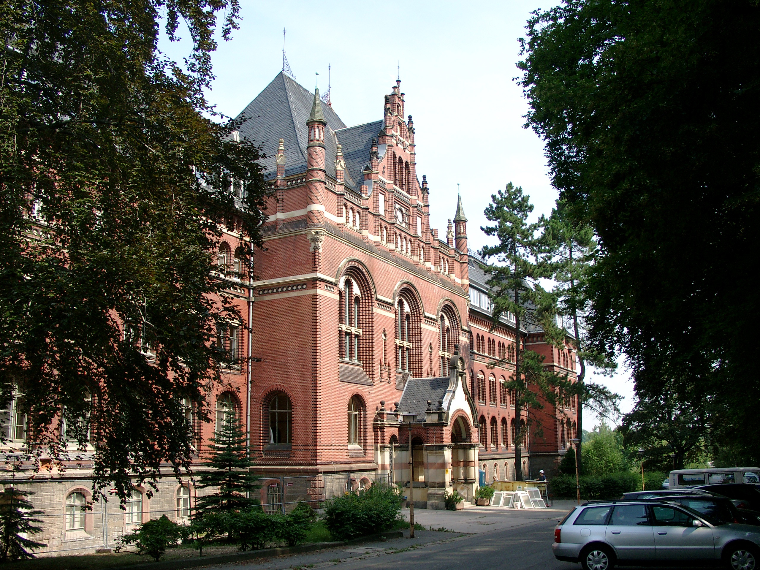 Straße der Freundschaft 11 in Annaberg-Buchholz; 1897-1900 erbaut als königl. sächs. Lehrerseminar Annaberg, bis 2006 als Haus C des Kreiskrankenhauses Annaberg-Buchholz genutzt, seit 2007 Evangelisches Gymnasium Erzgebirge